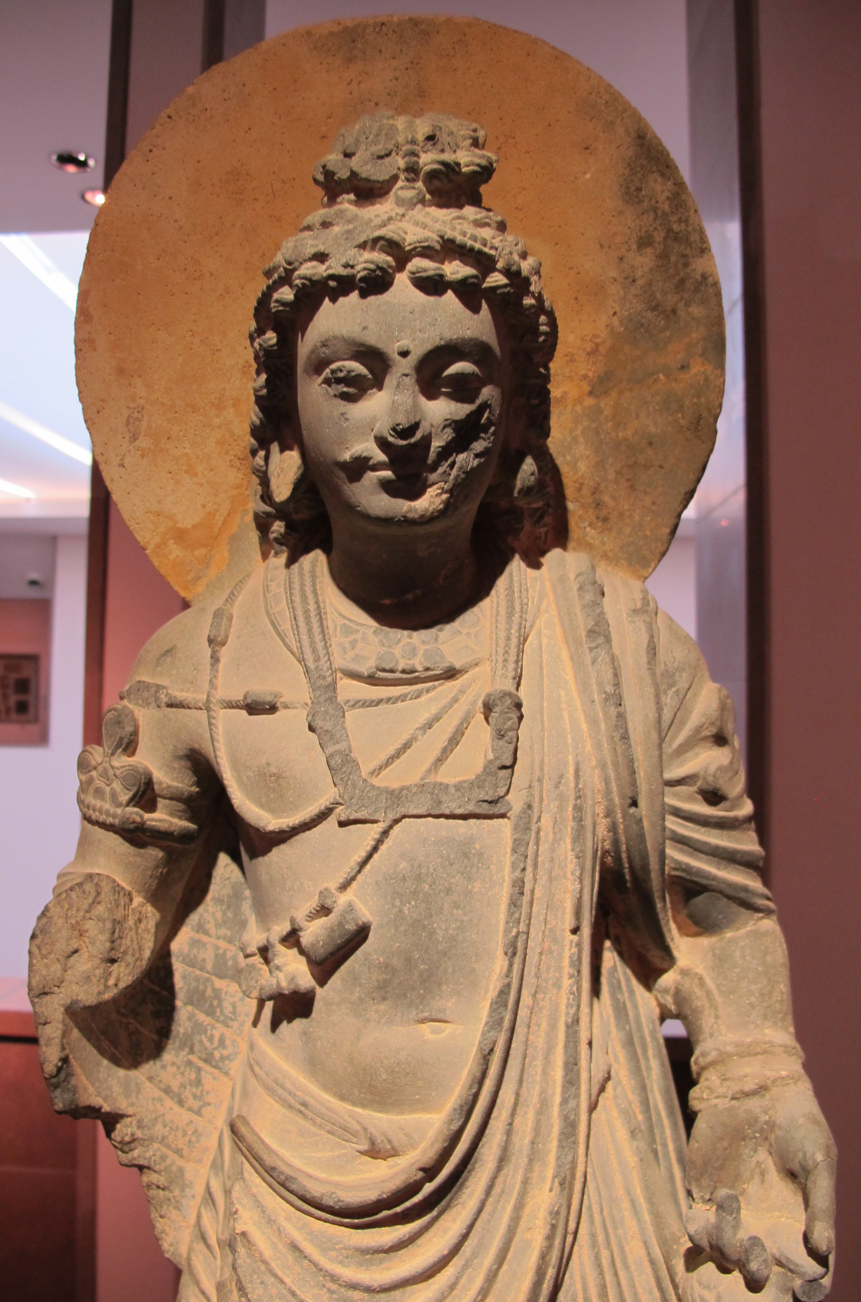 Gandhara, bodhisattva dell'avvenire, maitreya, I-III sec